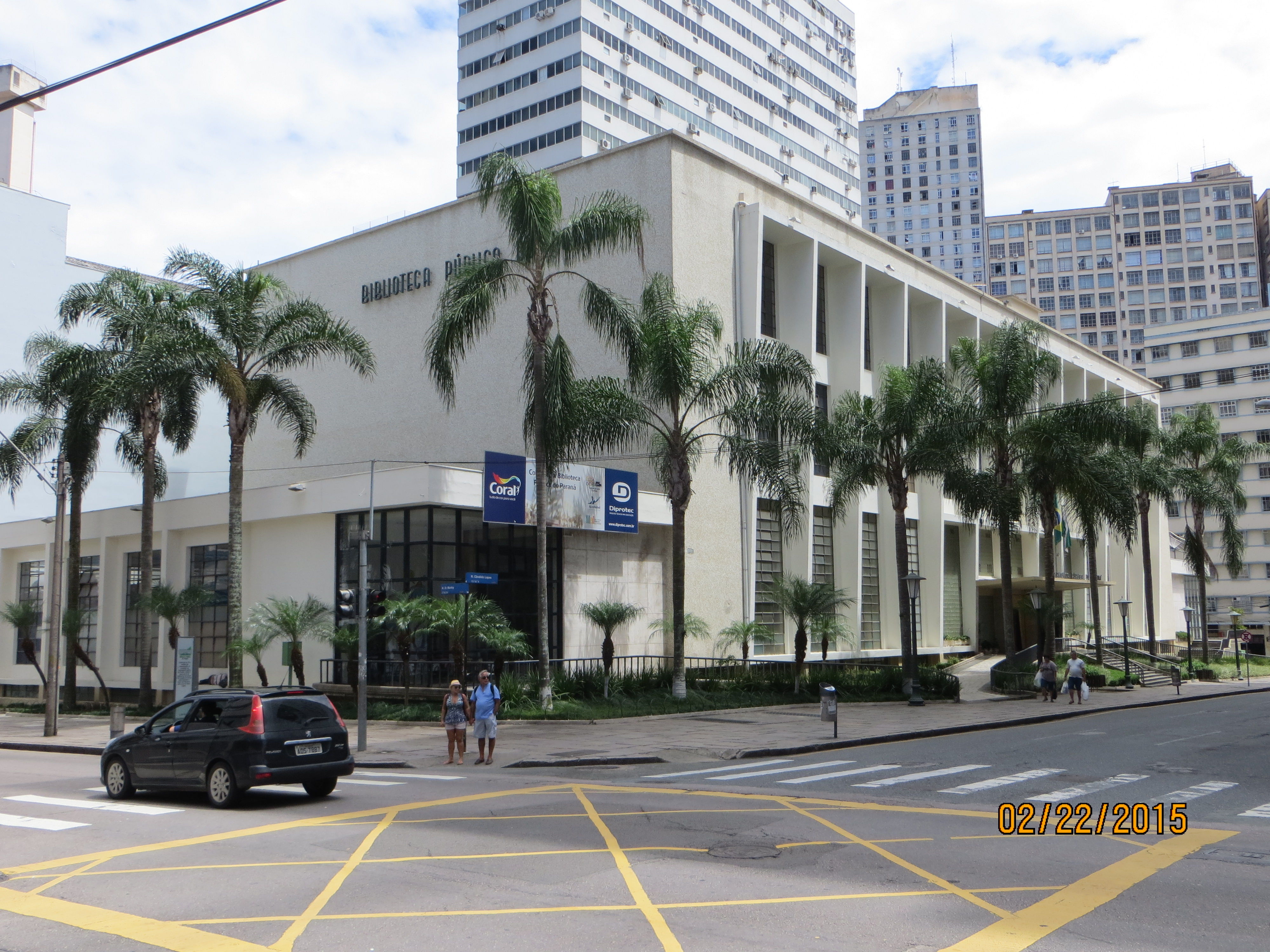 Biblioteca Pública do Paraná, re-construída em 1954 sob arquitetura modernista, a maior biblioteca pública do estado e da Região Sul do Brasil em número de acervo bibliográfico e documental.